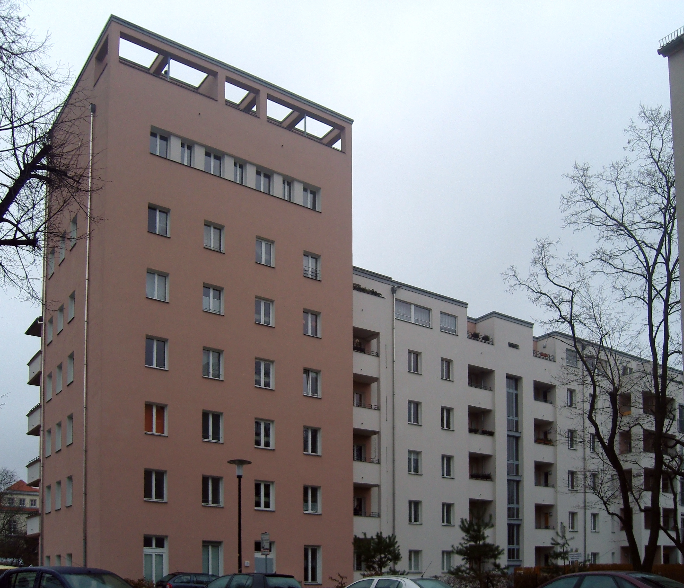 Denkmalgeschütztes Mehrfamilienwohnhaus Spenerstraße 25, 25b/Wormser Straße 42–48 im Dresdner Stadtteil Striesen